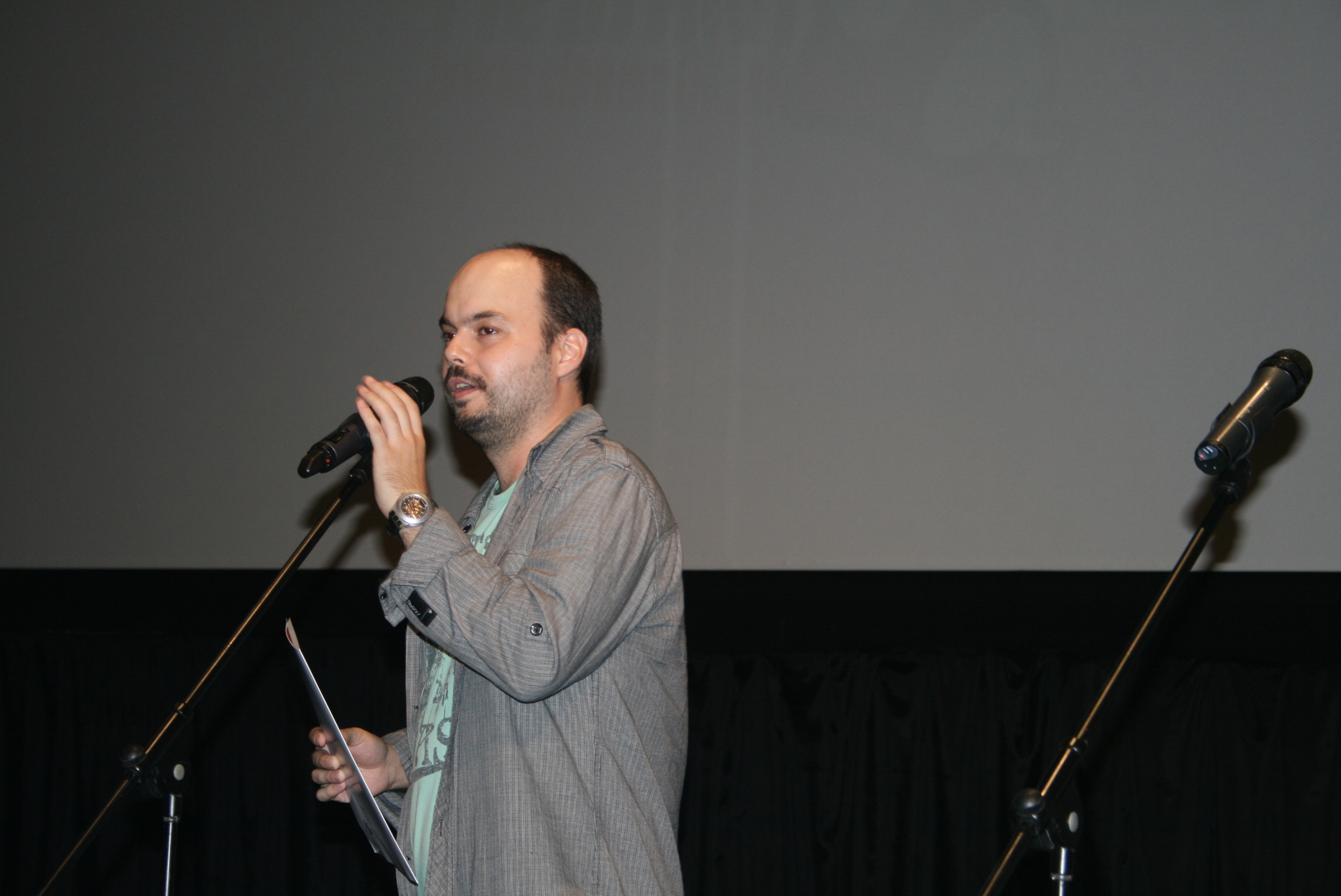 Filmový kritik Peter Konečný na festivale Cinematik v Piešťanoch 2012.